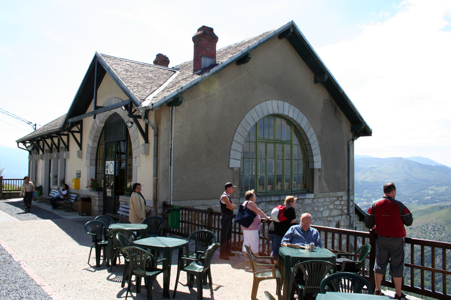 Station haute du funiculaire Pic du Jer (Jer's peek upper station), Lourdes